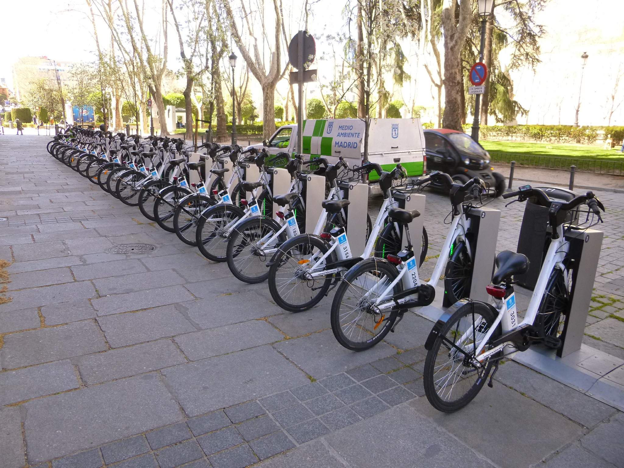 Madrid - Servicio municipal de bicicletas